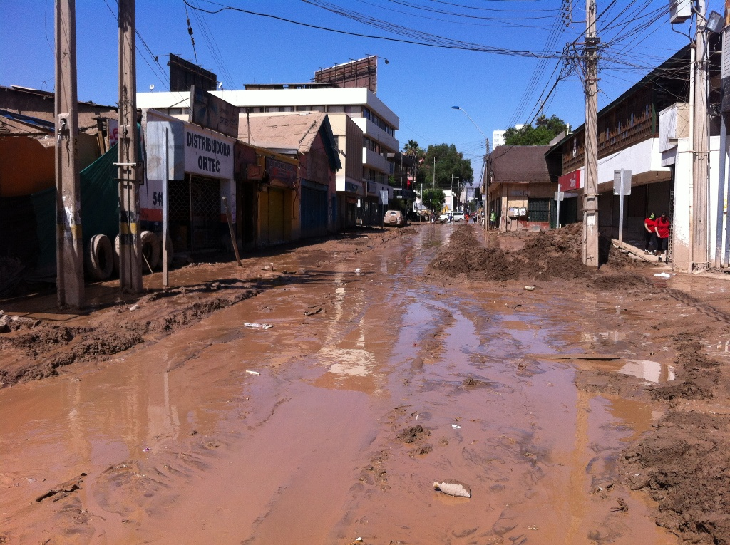 La Av. Los Carrera en Copiapó luego de la inundación por los temporales de marzo de 2015 (30-03-2015).